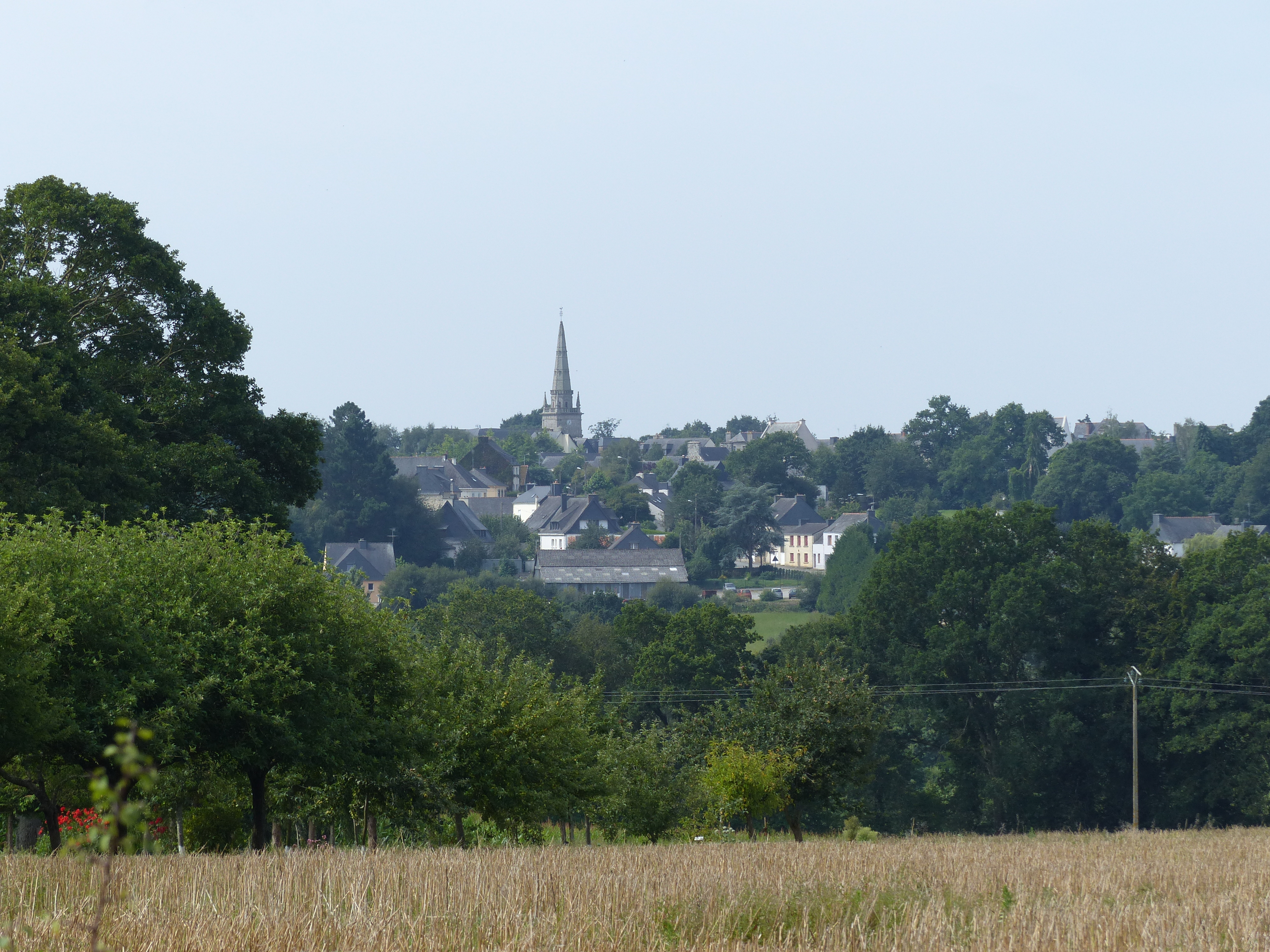 Naizin vue générale depuis la route du Salut